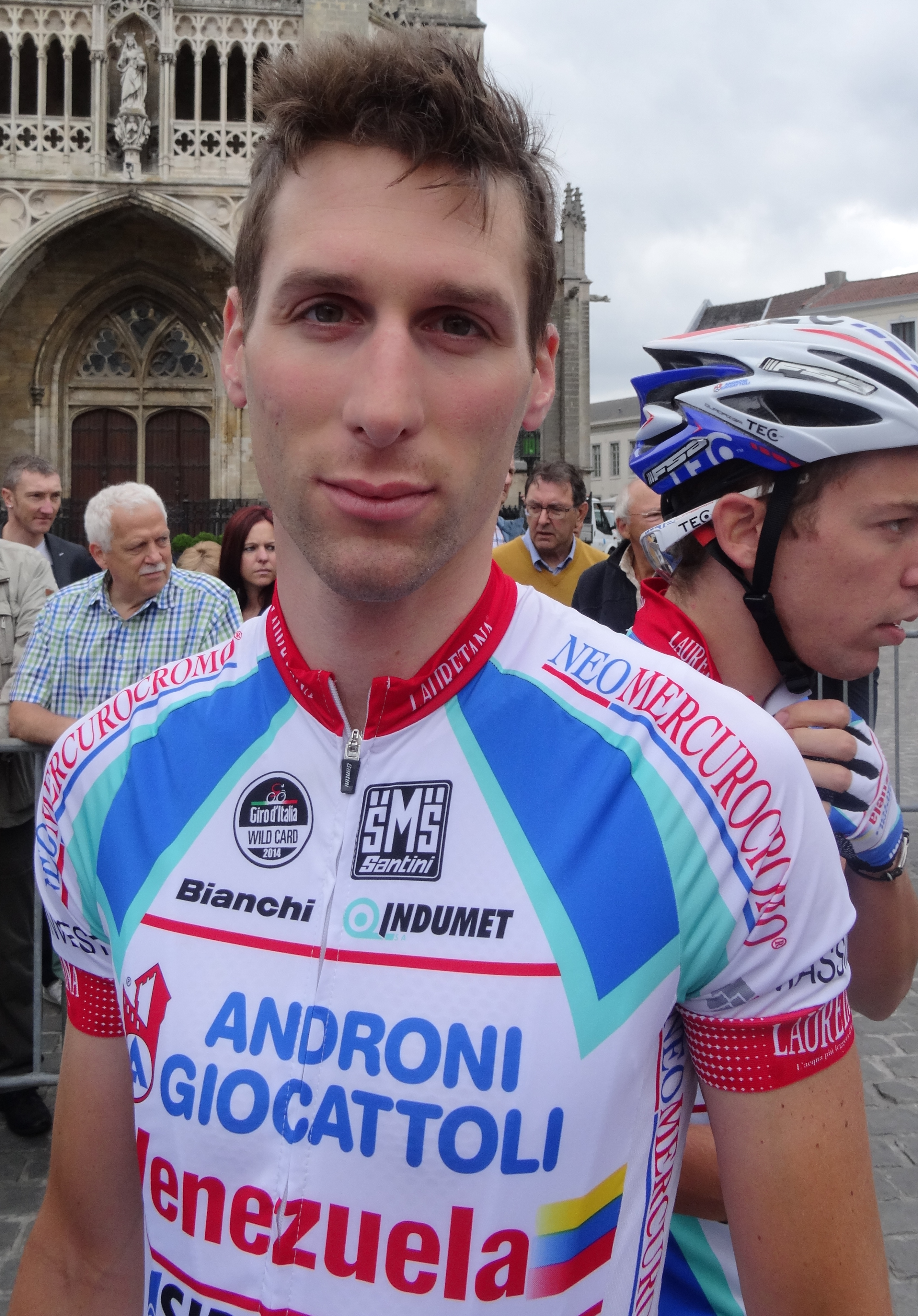 Reportage photographique réalisé le dimanche 15 juin à l'occasion du départ et de l'arrivée du Tour du Limbourg 2014 à Tongres, Belgique.